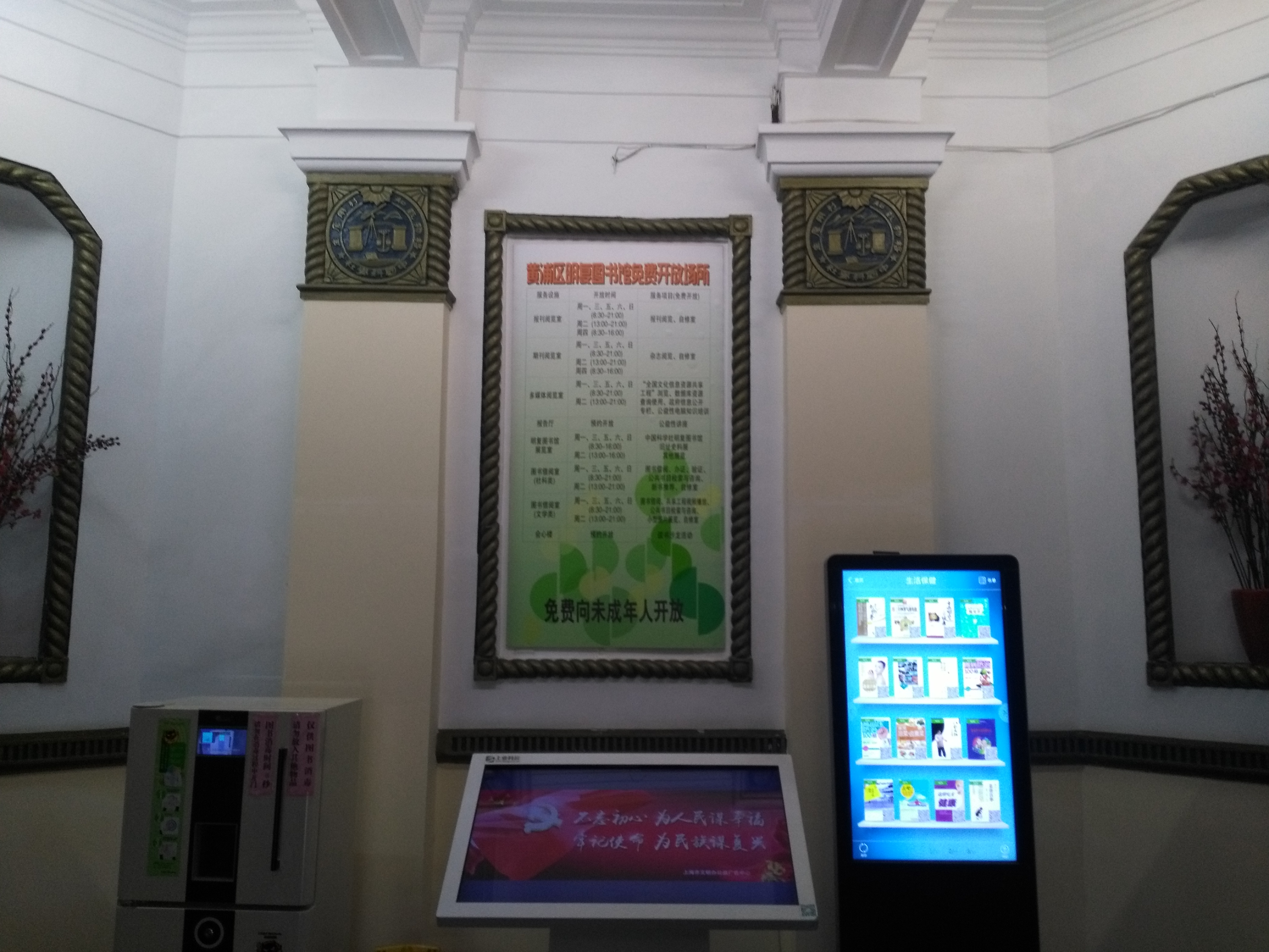 中文（中国大陆）: 明复图书馆一楼大堂